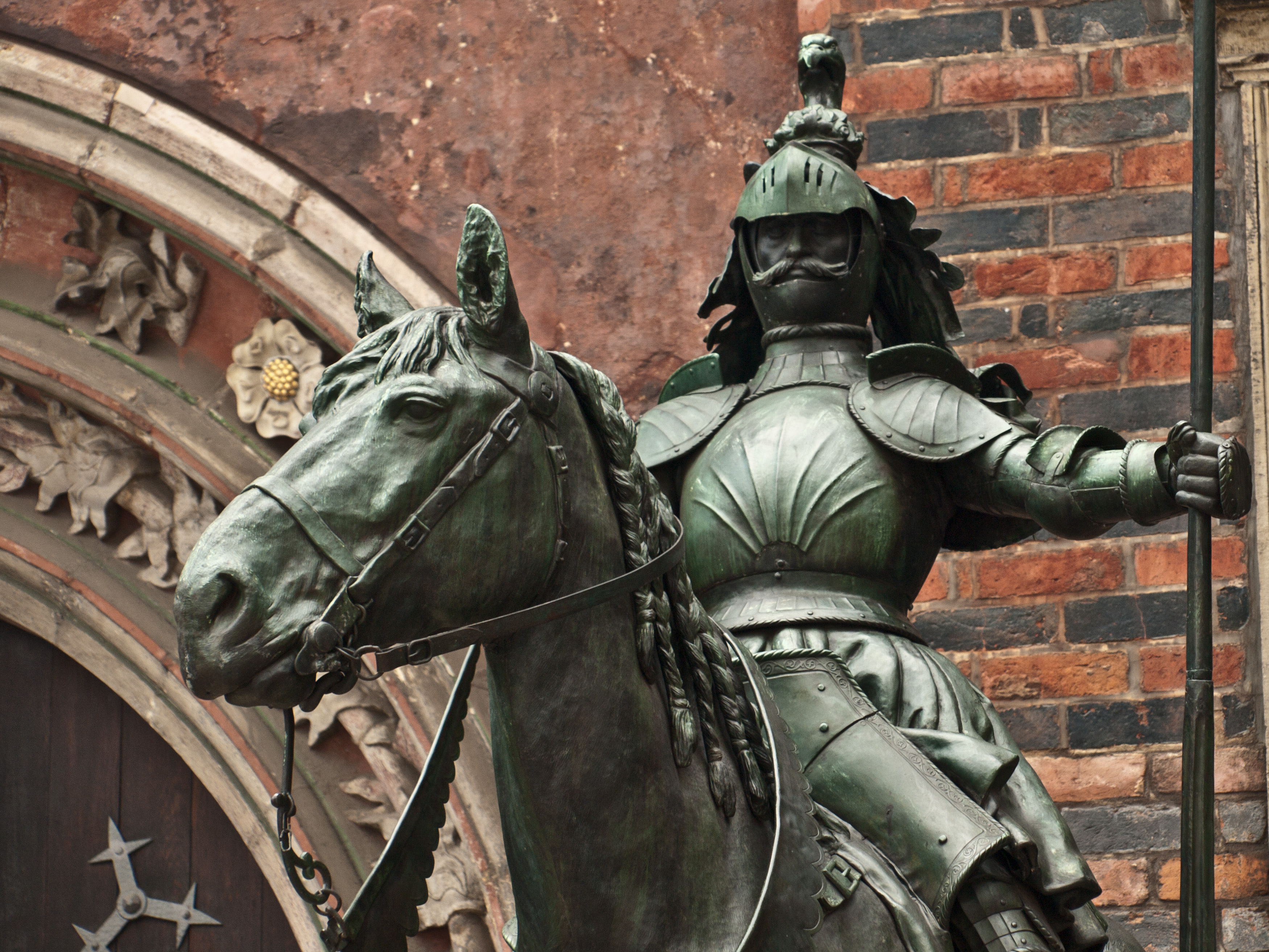 Herolde in Bremen,Das abgebildete Objekt ist ein geschütztes Kulturdenkmal in der Freien Hansestadt Bremen, mit der Nr. 0066,T004 beim Landesamt für Denkmalpflege registriert.